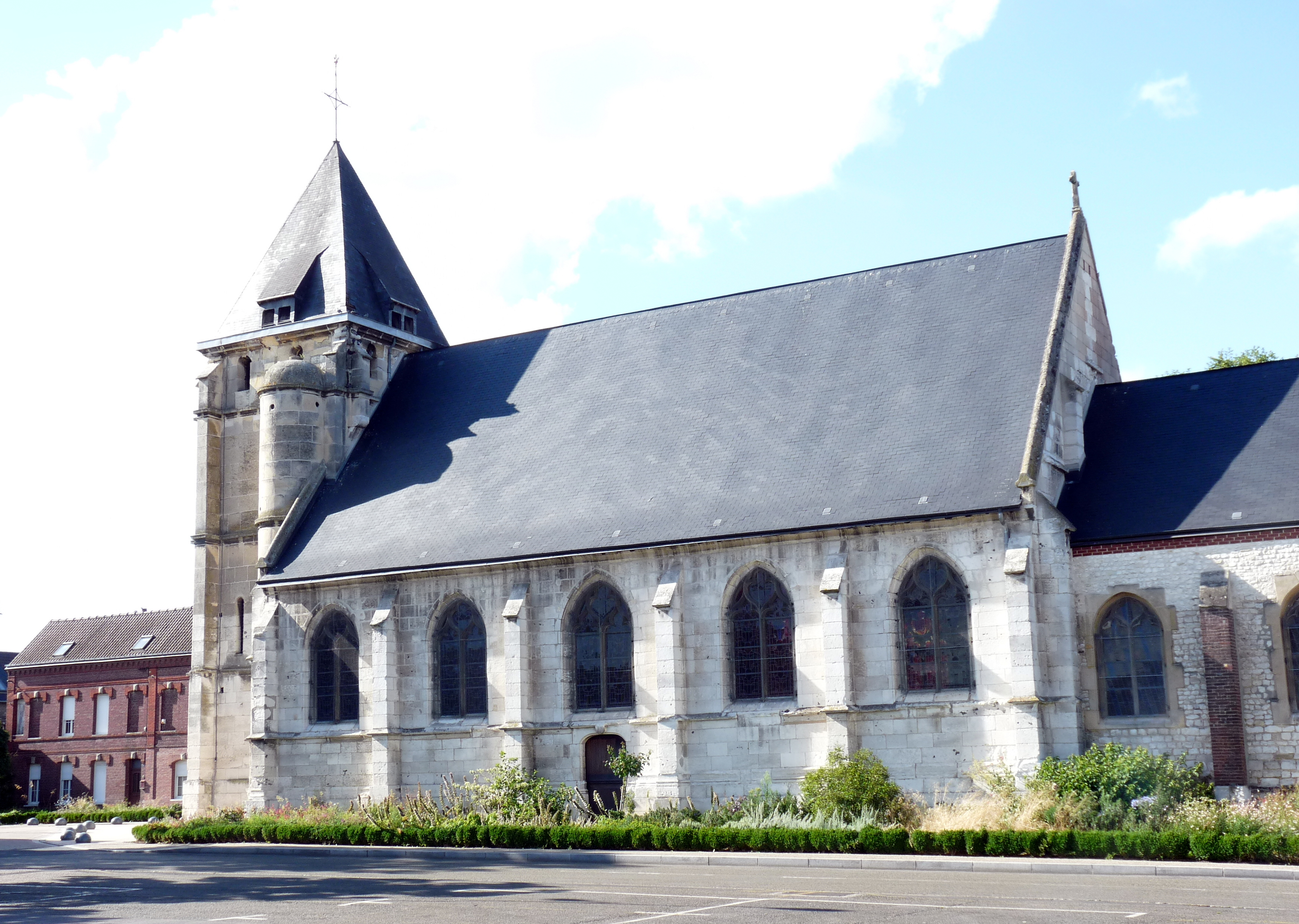 Église Saint-Étienne de Saint-Étienne-du-Rouvray - Vue du Sud-Est